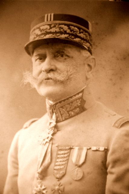 General Victor Goybet (1865-1947) , Grand officier de la Légion d'honneur.Il accomplit presque toute sa carrière dans les troupes alpines. À la mobilisation de 1914, Victor part comme chef d'État Major de la 66e division d'infanterie. En novembre, il est nommé au commandement du 95e régiment d'infanterie de ligne. Au cours de combats dans la forêt d'Aspremont, il fut blessé le mois suivant d'une balle qui lui sectionna trois doigts de la main droite. Il quitte son poste qu'après avoir donné ses derniers ordres. Dès qu'il a pu, il a repris son service sur le front. Il sera de nouveau blessé en mars 1916 à la main à cause d'un éclat d'obus. Commandant du 101e Régiment d'Infanterie puis de la 79e Brigade de Chasseurs alpins, il participe à la défense de Verdun. Il prend part à l'offensive de la Somme (1916). Il prend le commandement de la 165e Division d'Infanterie le 19 novembre 19165. Extrait citation à l'ordre de la IIe Armée No 884 du 10 septembre 17 concernant sa conduite de cette Division. « A assuré ainsi la conquête de trois positions successives comportant chacune plusieurs lignes de tranchées, et s'étendant sur deux kilomètres de profondeur, conquête accompagnée de la prise de plus de mille prisonniers valides et de nombreuses mitrailleuses. ». Il sera encore cité à l'ordre de la Xième armée le 20 septembre 1918 pour avoir conduit avec succès ses régiments sur la Somme, l'Aisne et à Verdun et pour avoir réussi une attaque avec une rapidité exceptionnelle et l'enlèvement d'une position particulièrement forte. capture de 300 prisonniers, 20 canons et de nombreuses mitrailleuses. Le 10 aout 1918 en Picardie, il conduit ses régiments à l'attaque sur une progression de 12 km. Il enraye une contre attaque le 12. Il atteint son objectif d'occuper le Bois des loges. Il occupe la Place de Mayence le 9 décembre 1918. Il était le premier commandant à Mayence depuis l'armistice de 1918.